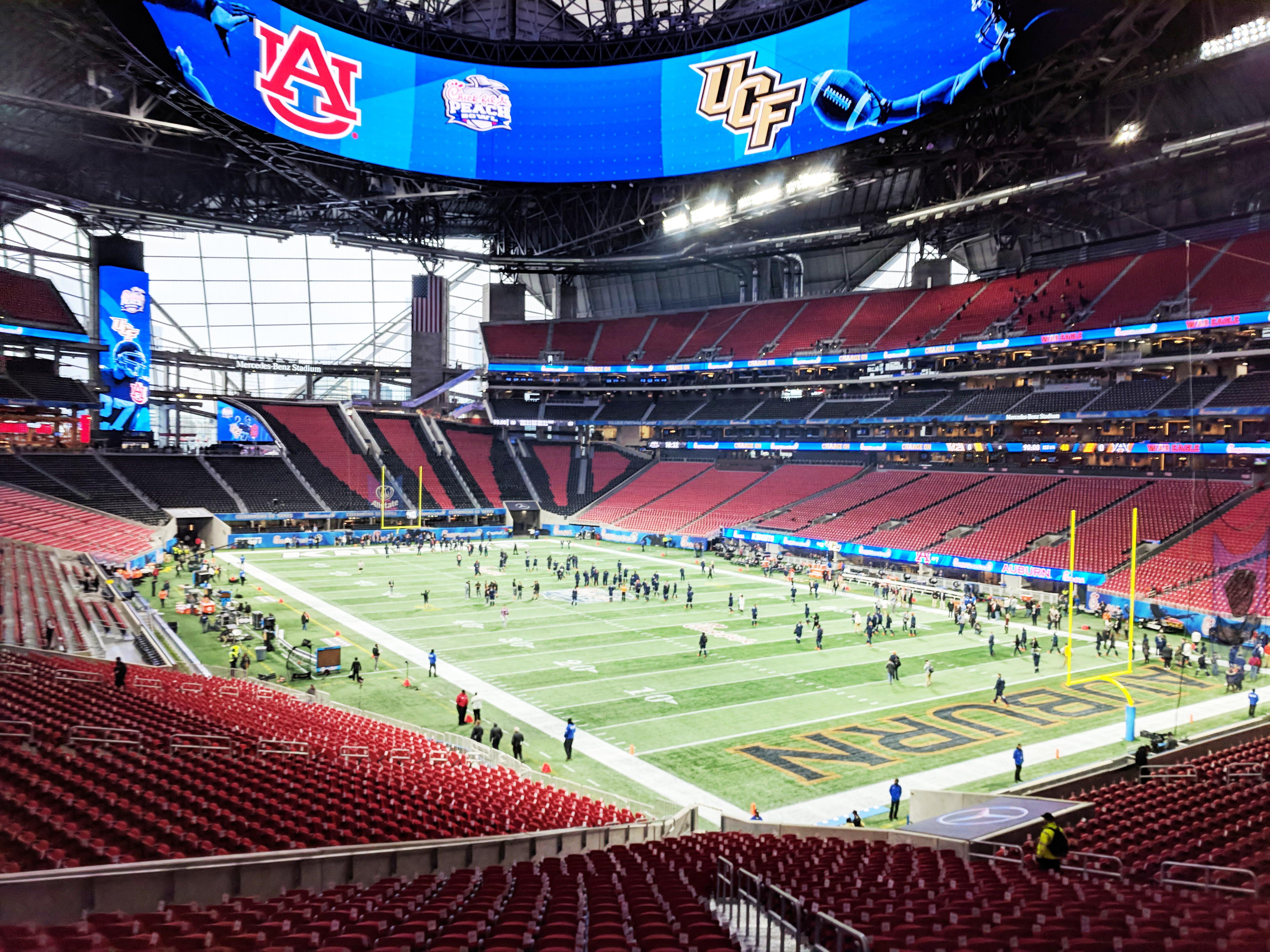 100 level